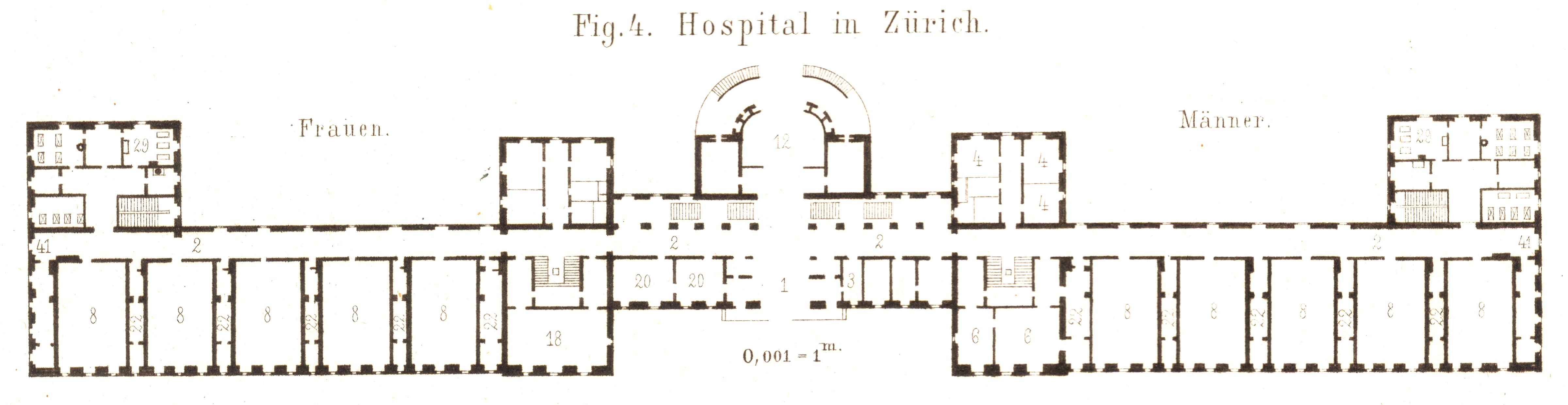 Zürich - Altes Kantonsspital, Grundriss. Legende: 1 Eingang 2 Verbindungsgänge 3 Portier 4 Bureaus 6 Aufnahmezimmer 8 Krankensäle 12 Operationssaal 18 Bibliothek 20 Apotheke 22 Bäder 29 Zimmer für Wärter 41 Säle für Behandlung des Aussatzes